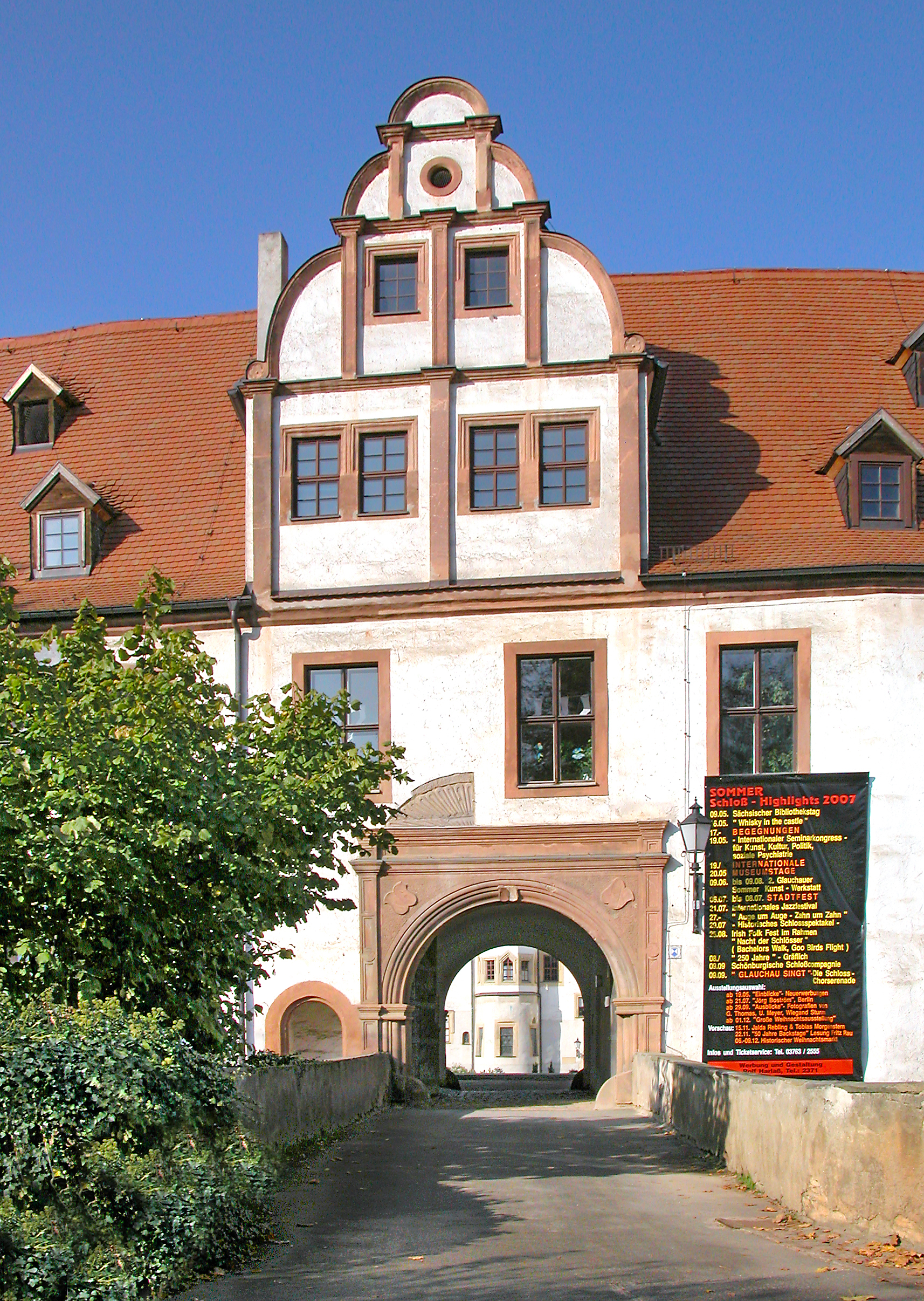 16.10.2007 08371 Glauchau, Schloßstraße 1: Schloßanlage Forderglauchau / Hinterglauchau. Torhaus Forderglauchau. [DSCN30750.TIF]20071016305DR.JPG(c)Blobelt